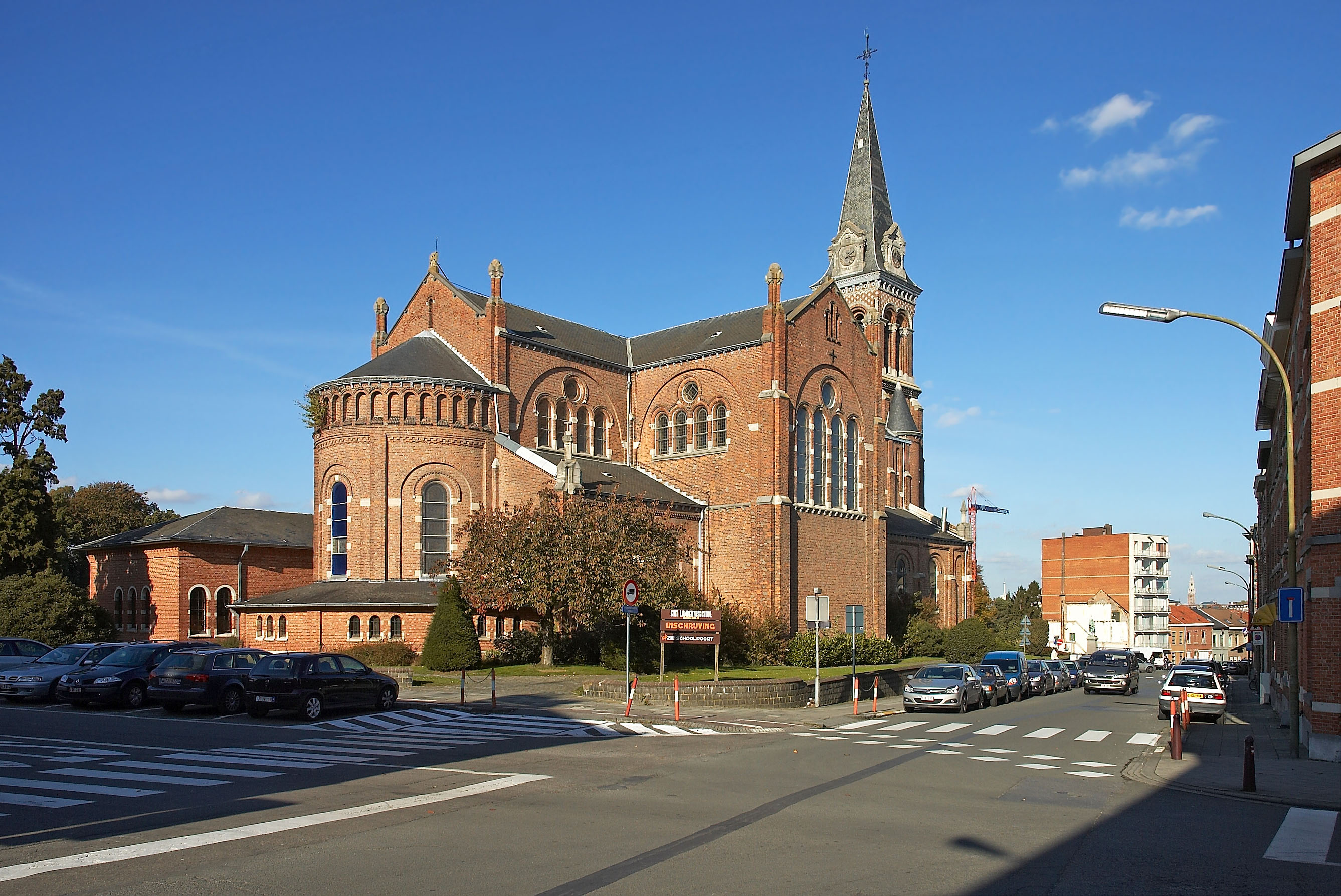 Sint-Lambertuskerk in Heverlee